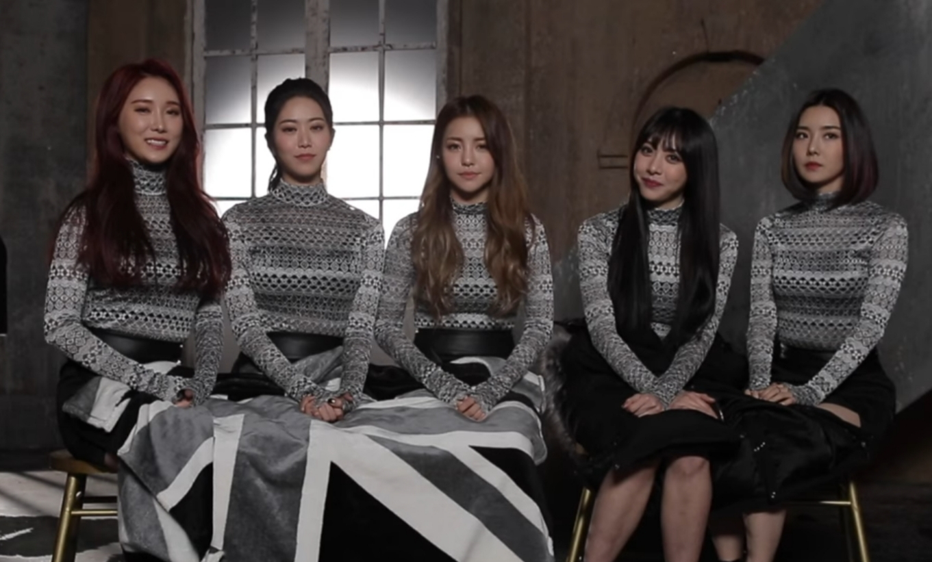 브레이브걸스 - 롤린 뮤직비디오 촬영현장